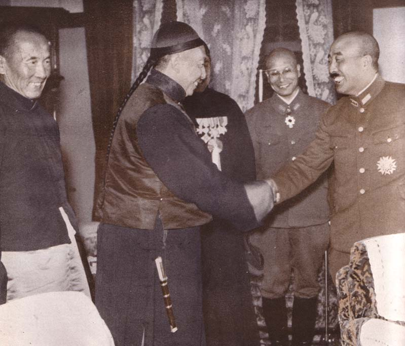 来日し、板垣陸相と会見する徳王。